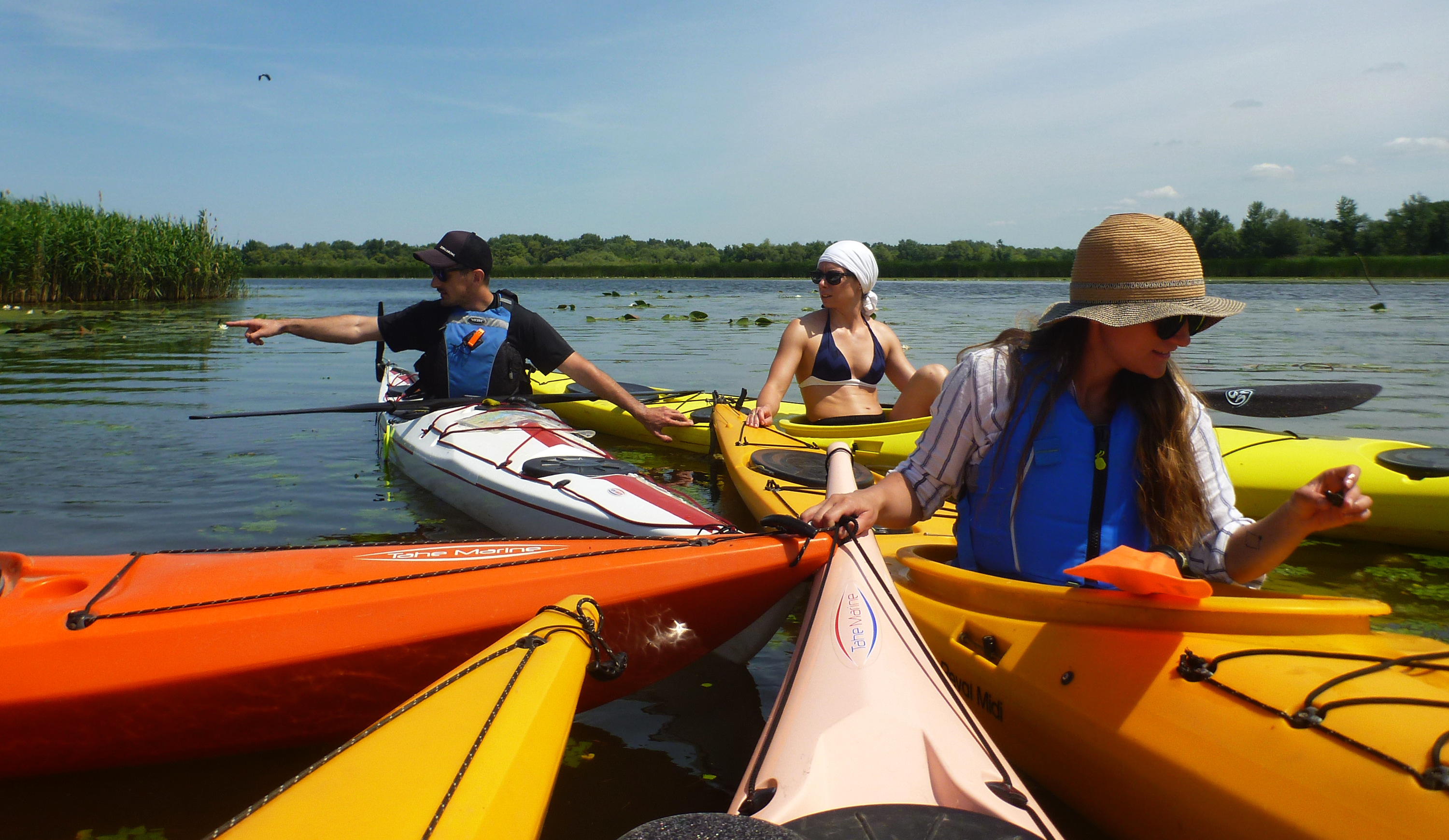 Kajakozás a Tisza-tavon tengeri kajakokkal